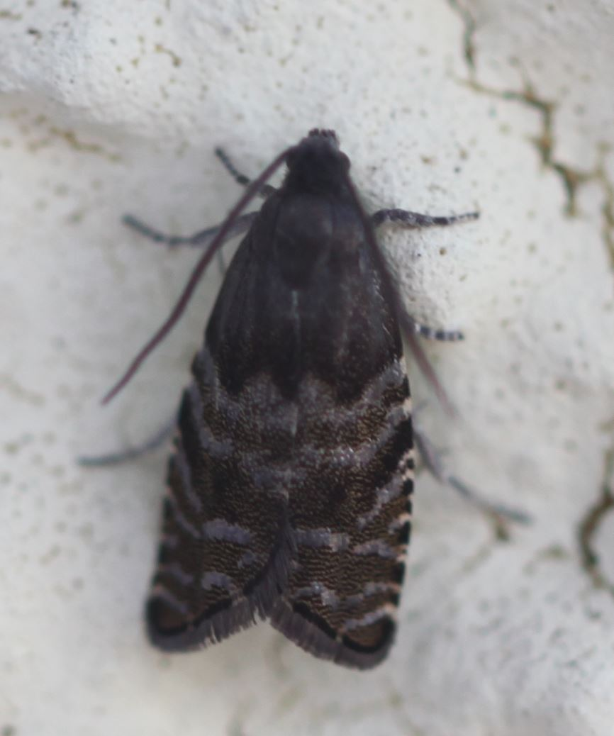 Fichtenzapfenwickler (Cydia strobilella) am 11. April 2020